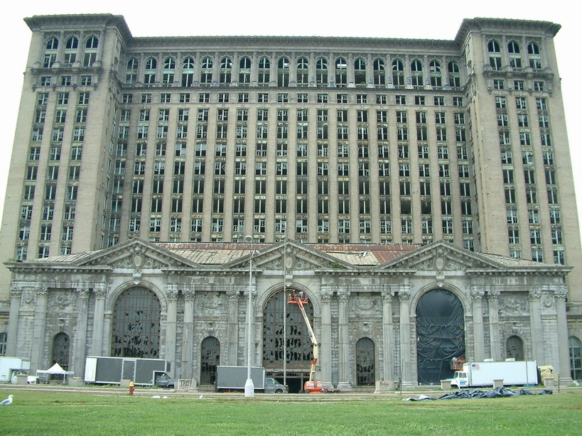 Michigan Central Station (2005)